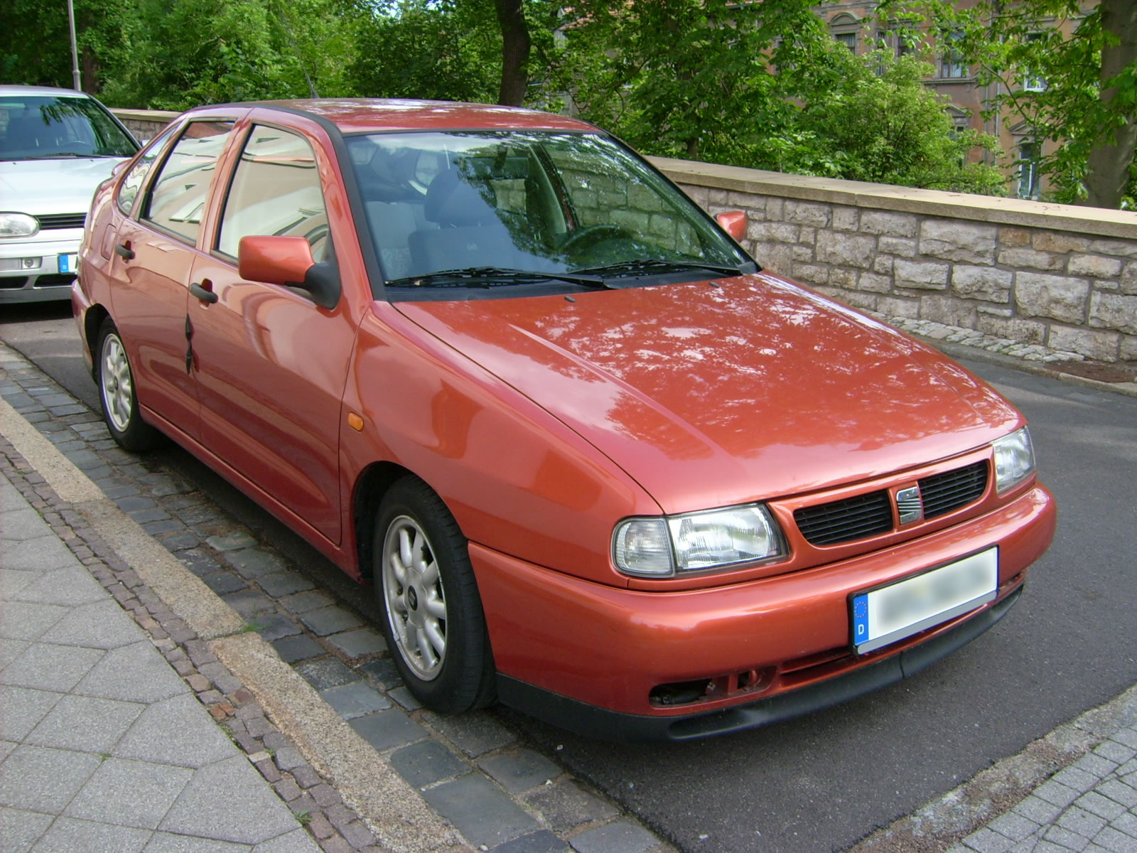 Seat Cordoba, 1995 pequeño rediseño que solo estubo durante 1 año y medio, el cual solo se modificaron los paragolpes, al año siguiente finales de 1996 le llegaria otra pequeña actulización con unos parachoques similares.